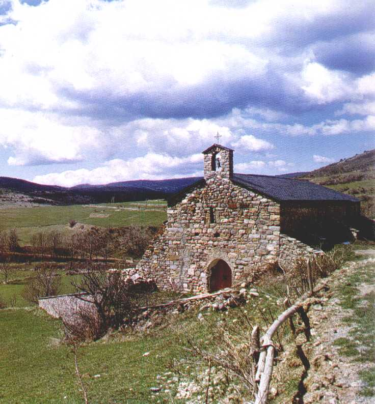 És una fotografia pròpia